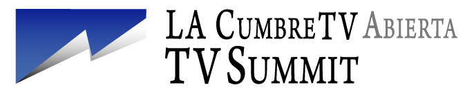 Logo